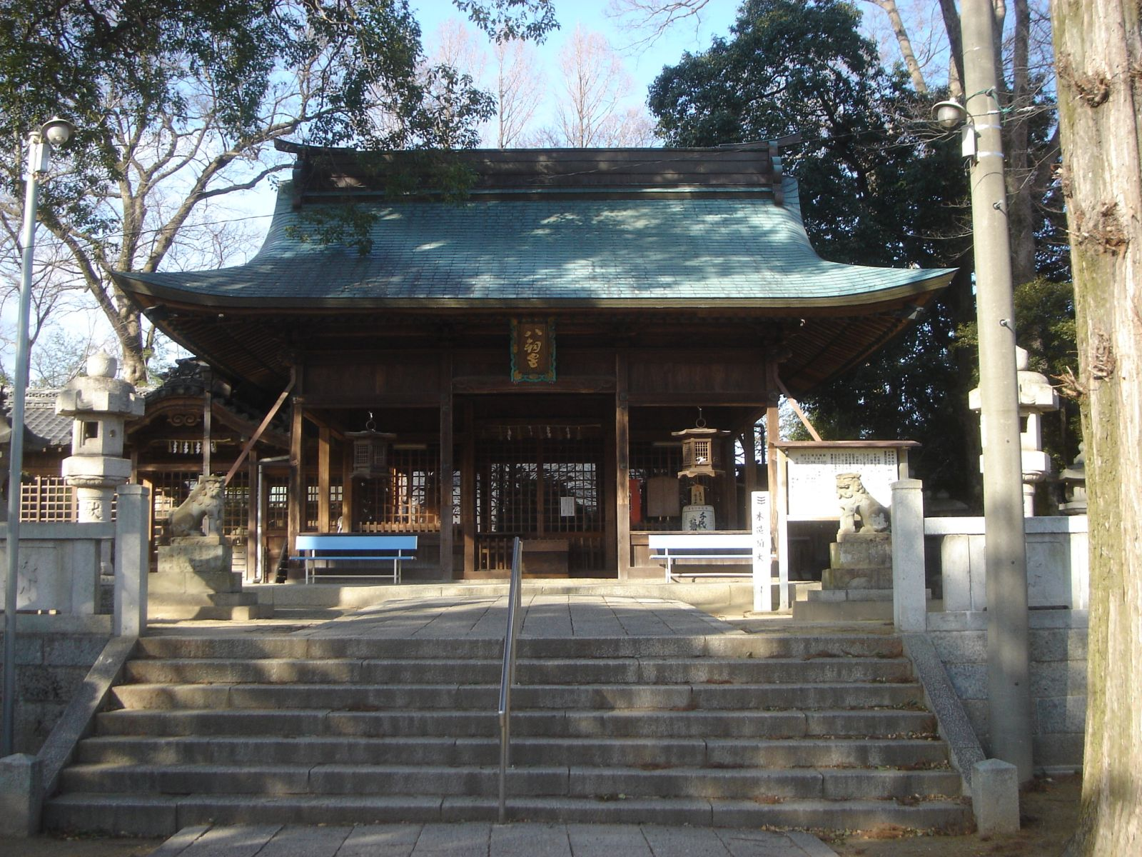 Hakken Jinja(Shrine)in Hashima city(八剣神社),Hashima,Gifu,Japan(岐阜県羽島市竹鼻町)で撮影。